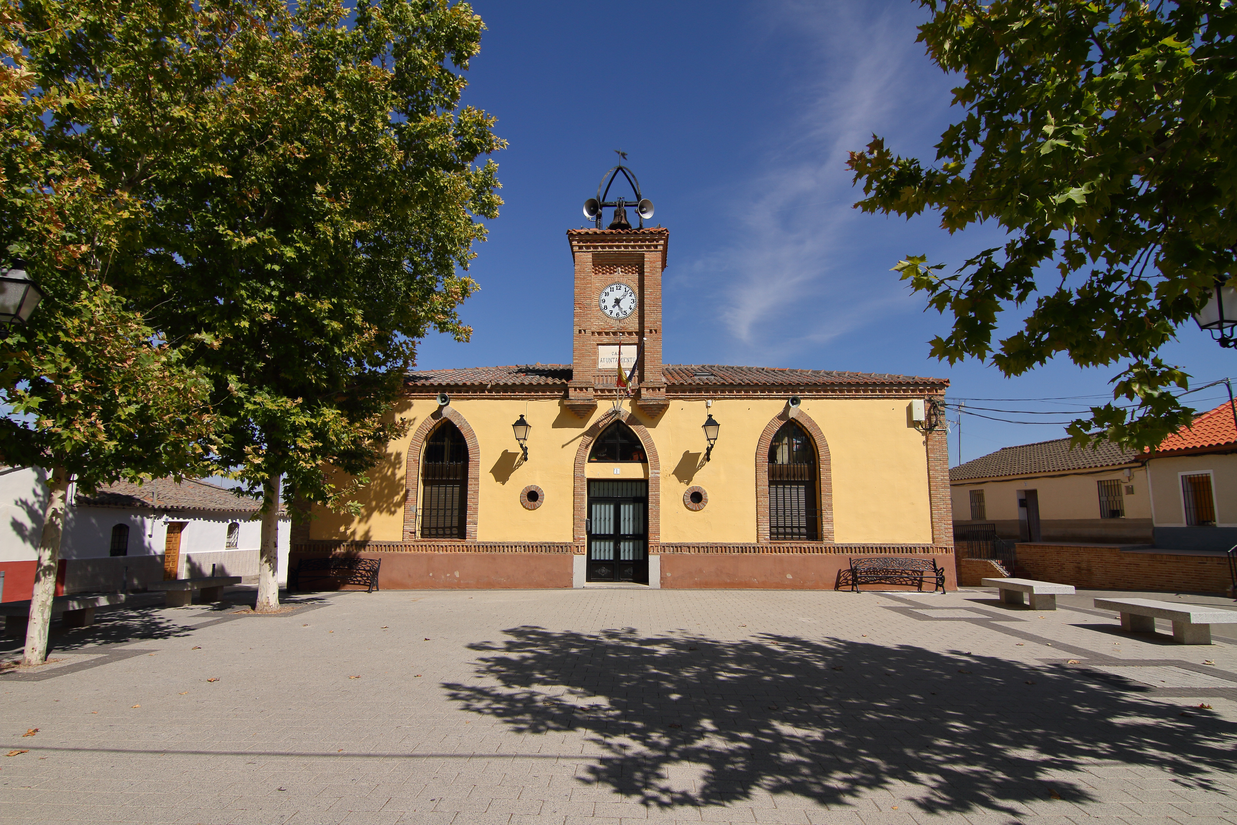 Rielves, Ayuntamiento